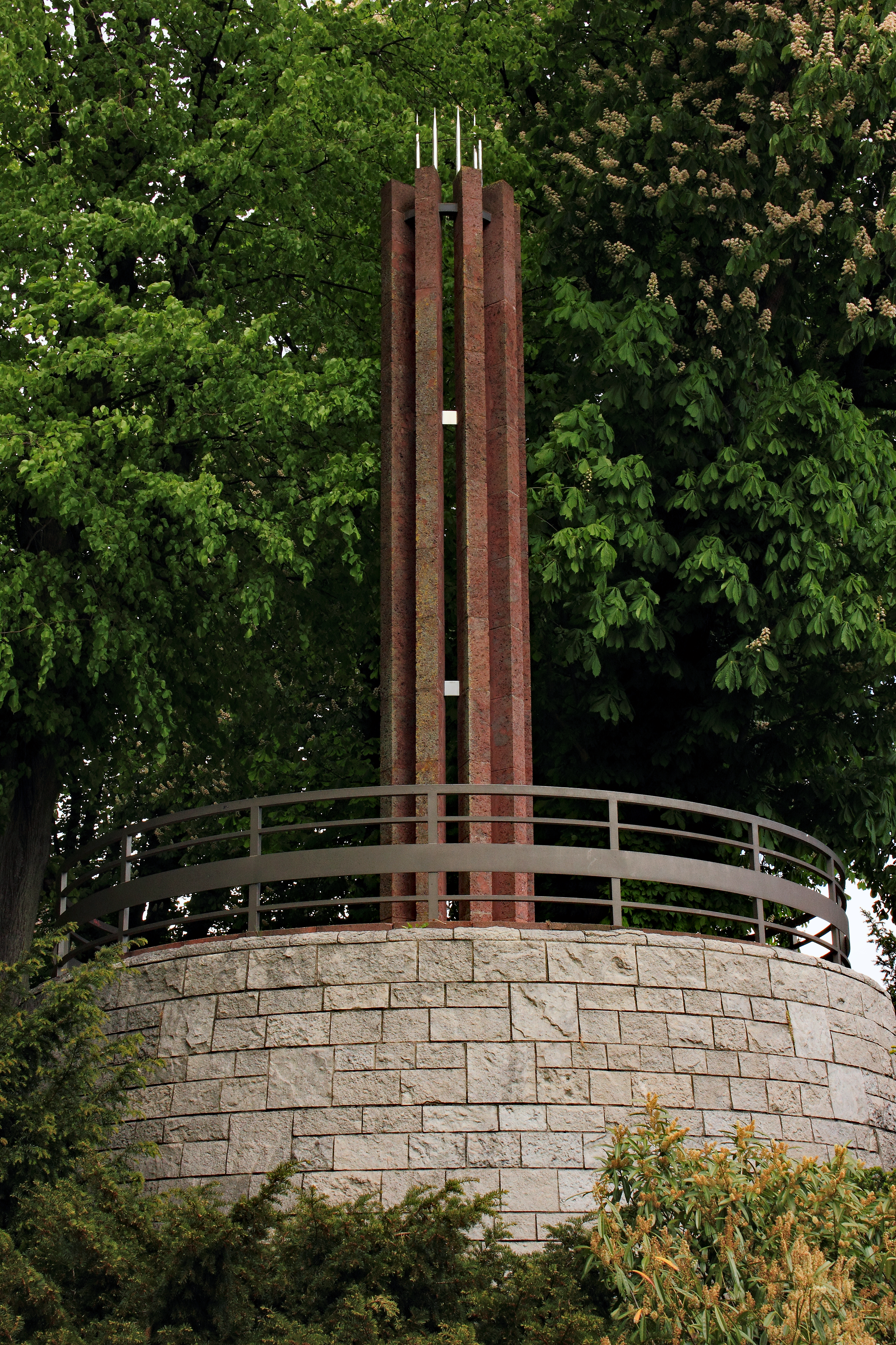 Gefallenen-Ehrenmal der CAU (auch irreführend "Langemarck-Denkmal" genannt), 1931 von Gustav August Munzer am Schlossgarten in Kiel-Düsternbrook. S.a. Mythos von Langemarck und Kunst@SH: Gustav August Munzer, Studenten-Ehrenmal